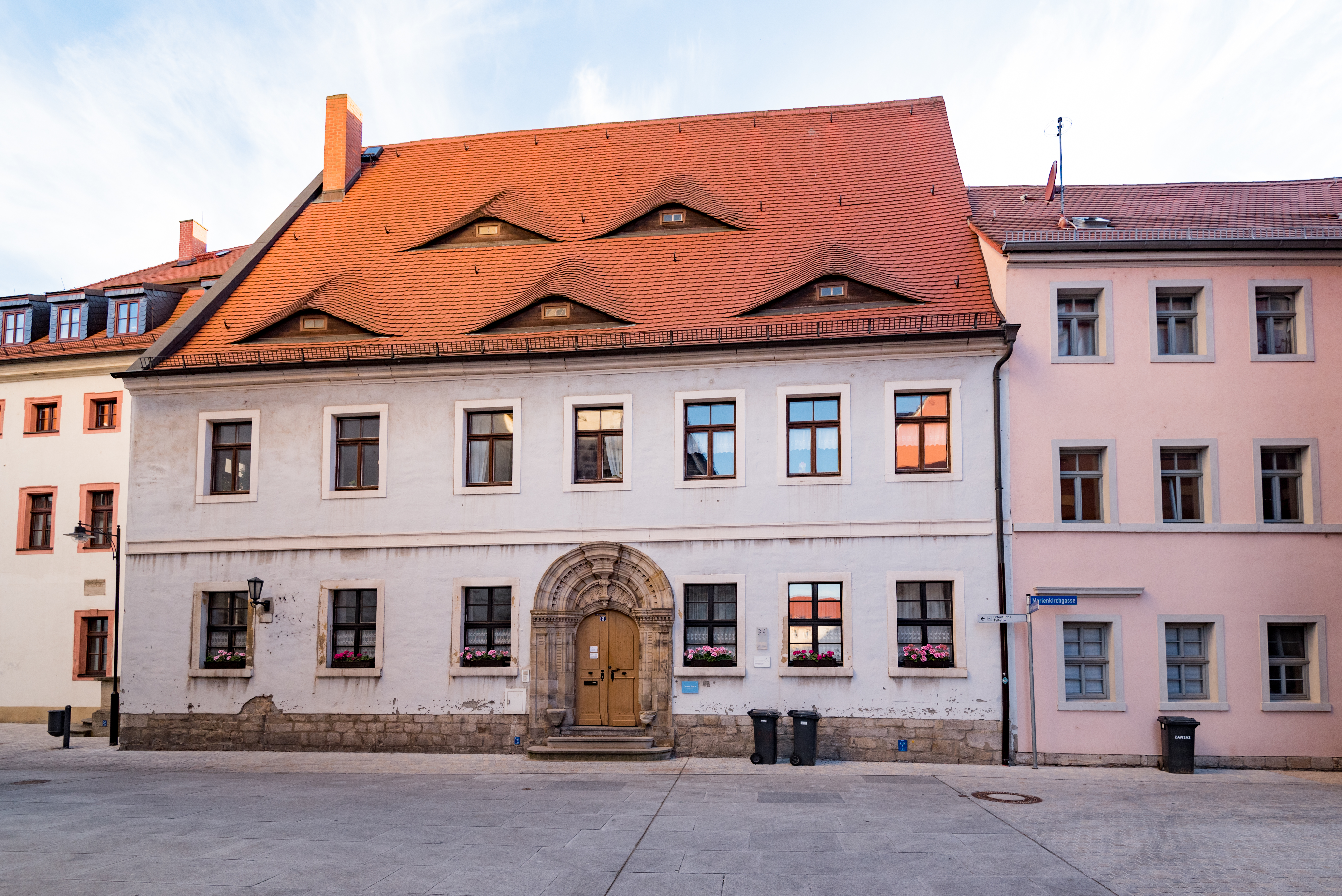 Weißenfels, Marktkirchgasse 3